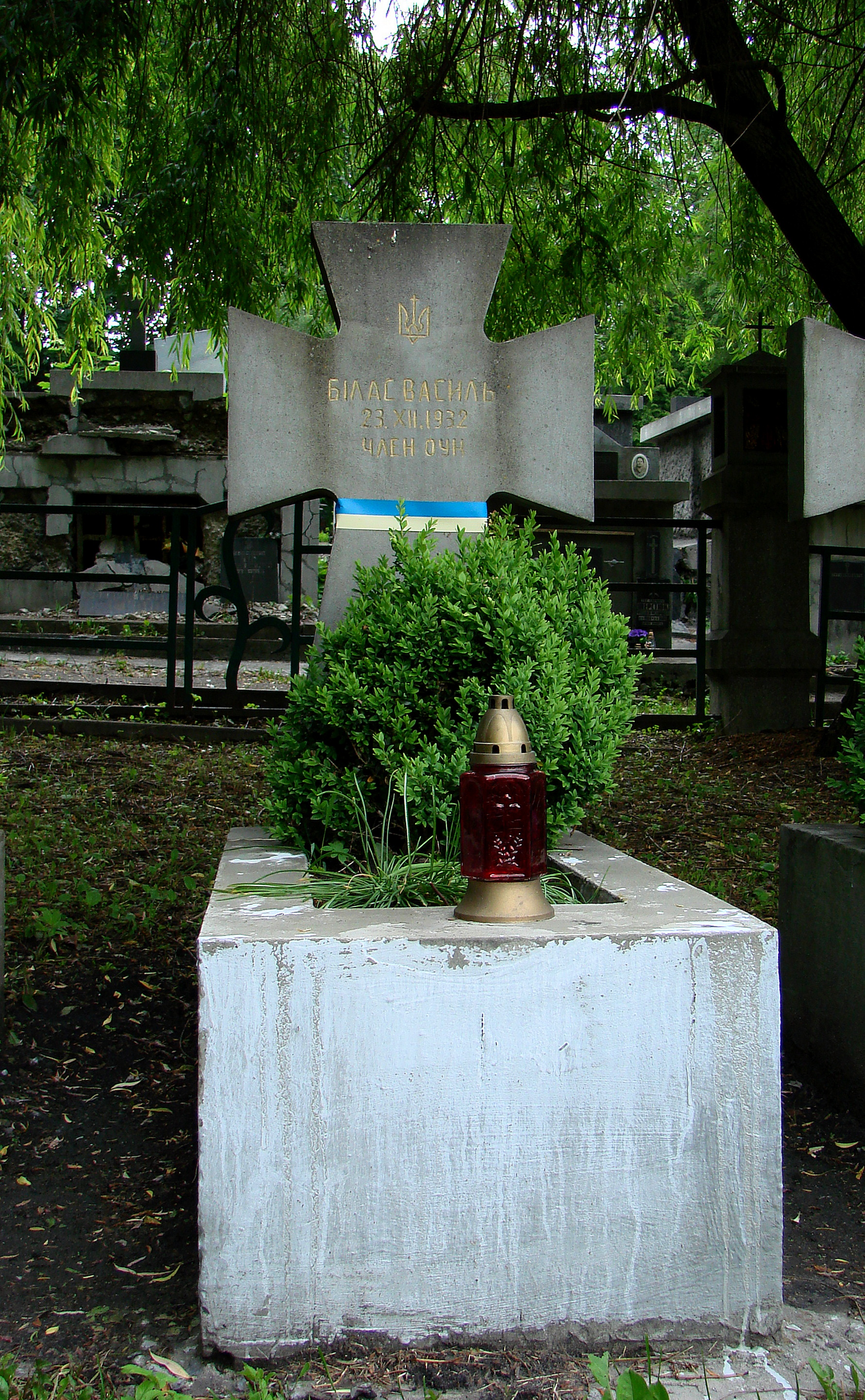 Пам'ятник на могилі Василя Біласа.Янівський цвинтар.